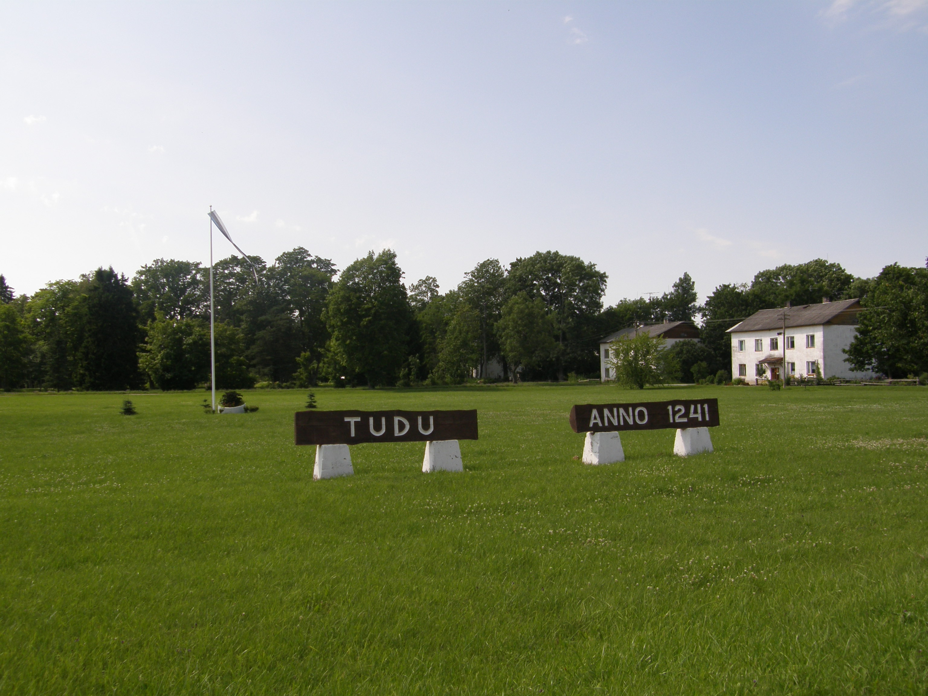 Tudu lipuväljak.